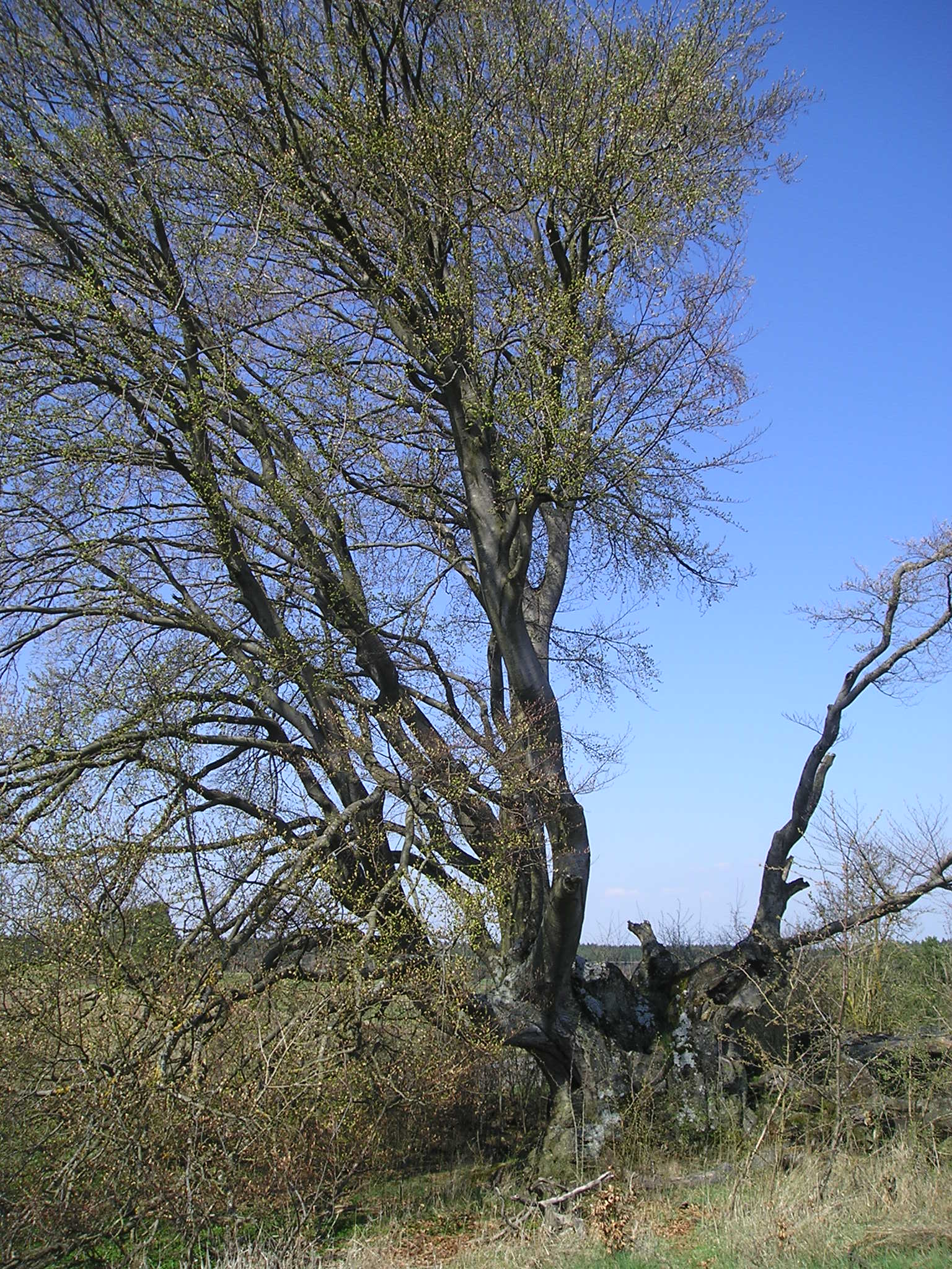 Sterbende Bavaria-Buche bei Pondorf